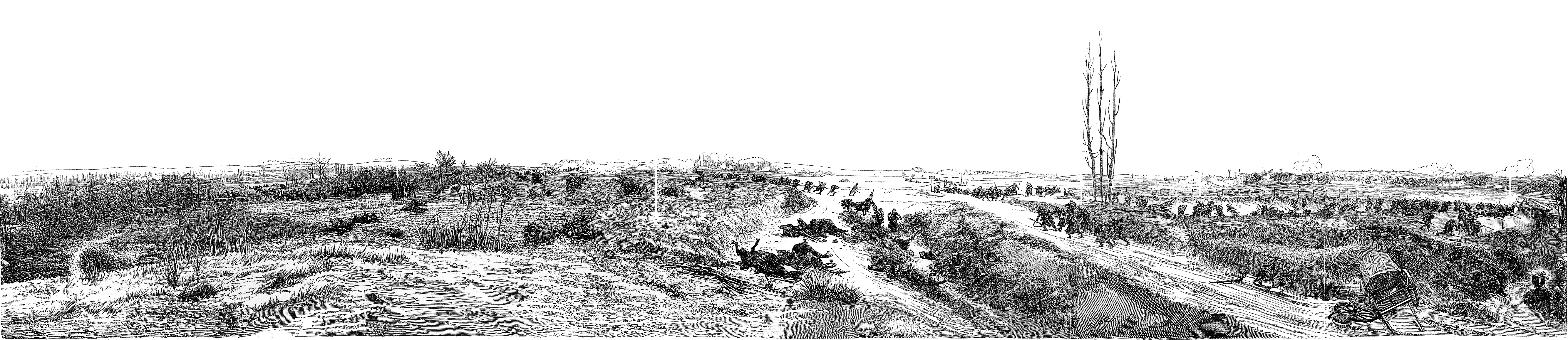 Dessin représentant la partie exécutée par Édouard Detaille du panorama La Bataille de Champigny, issu du livret descriptif du panorama vendu aux visiteurs. Version nettoyée et sans les flèches numérotées.